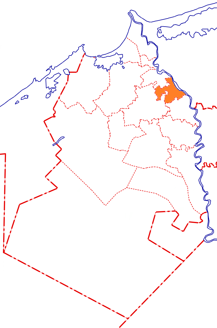 خريطة مركز الرحمانية بالنسبة لمحافظة البحيرة، مصر.